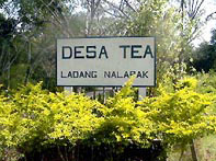 Ladang teh nalapak